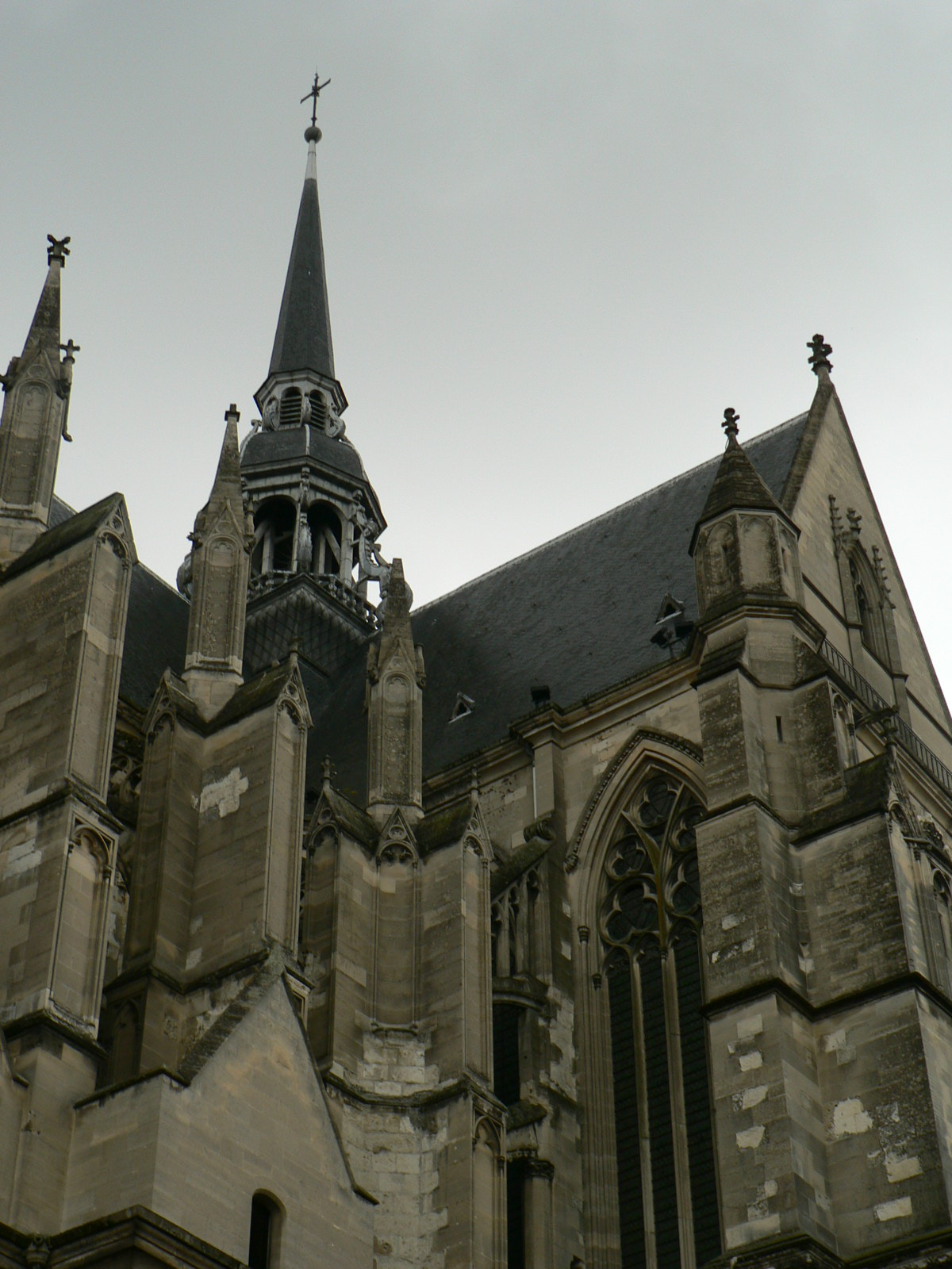 Basilique Saint-Quentin (Picardie)